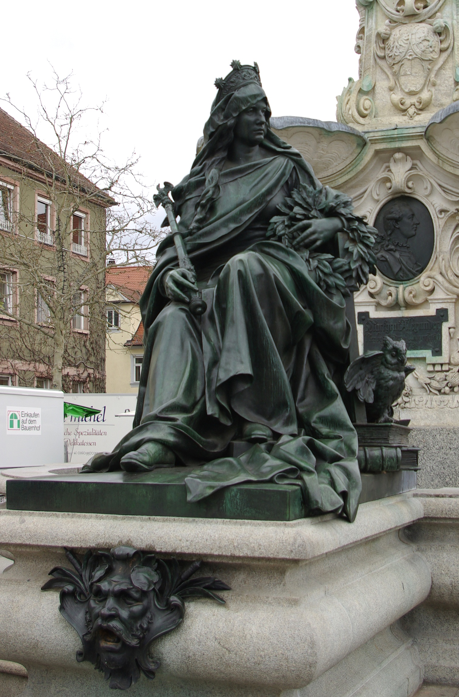 Alma Mater mit den Symbolen der Wissenschaft. Eine der beiden allegorischen Figuren am Paulibrunnen auf dem Erlanger Marktplatz.